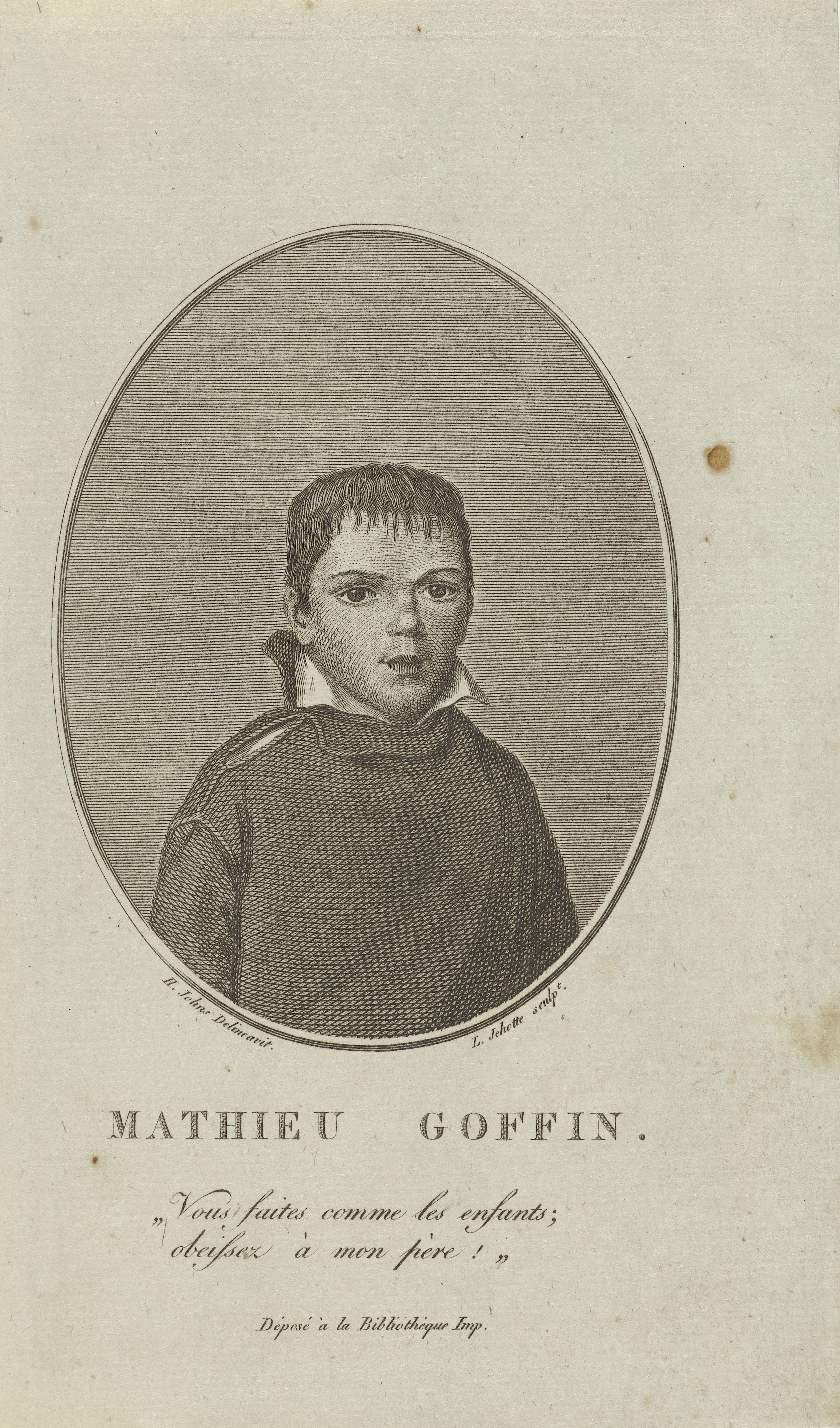 IdentificatieTitel(s): Portret van Mathieu GoffinObjecttype: prent Objectnummer: RP-P-1910-4346Opschriften / Merken: verzamelaarsmerk, verso, gestempeld: Lugt 2228Omschrijving: Portretbuste van Mathieu Goffin, zoon van Hubert Goffin. Onder de omlijsting de naam van de geportretteerde en twee regels in het Frans.VervaardigingVervaardiger: prentmaker: Léonard Jéhotte (vermeld op object)naar tekening van: H. Johns (vermeld op object)Plaats vervaardiging: Zuid-NederlandDatering: 1782 - 1851Fysieke kenmerken: gravureMateriaal: papier Techniek: graveren (drukprocedé)Afmetingen: blad: h 193 mm × b 113 mmOnderwerpWie: Mathieu GoffinVerwerving en rechtenVerwerving: aankoop 1905Copyright: Publiek domein